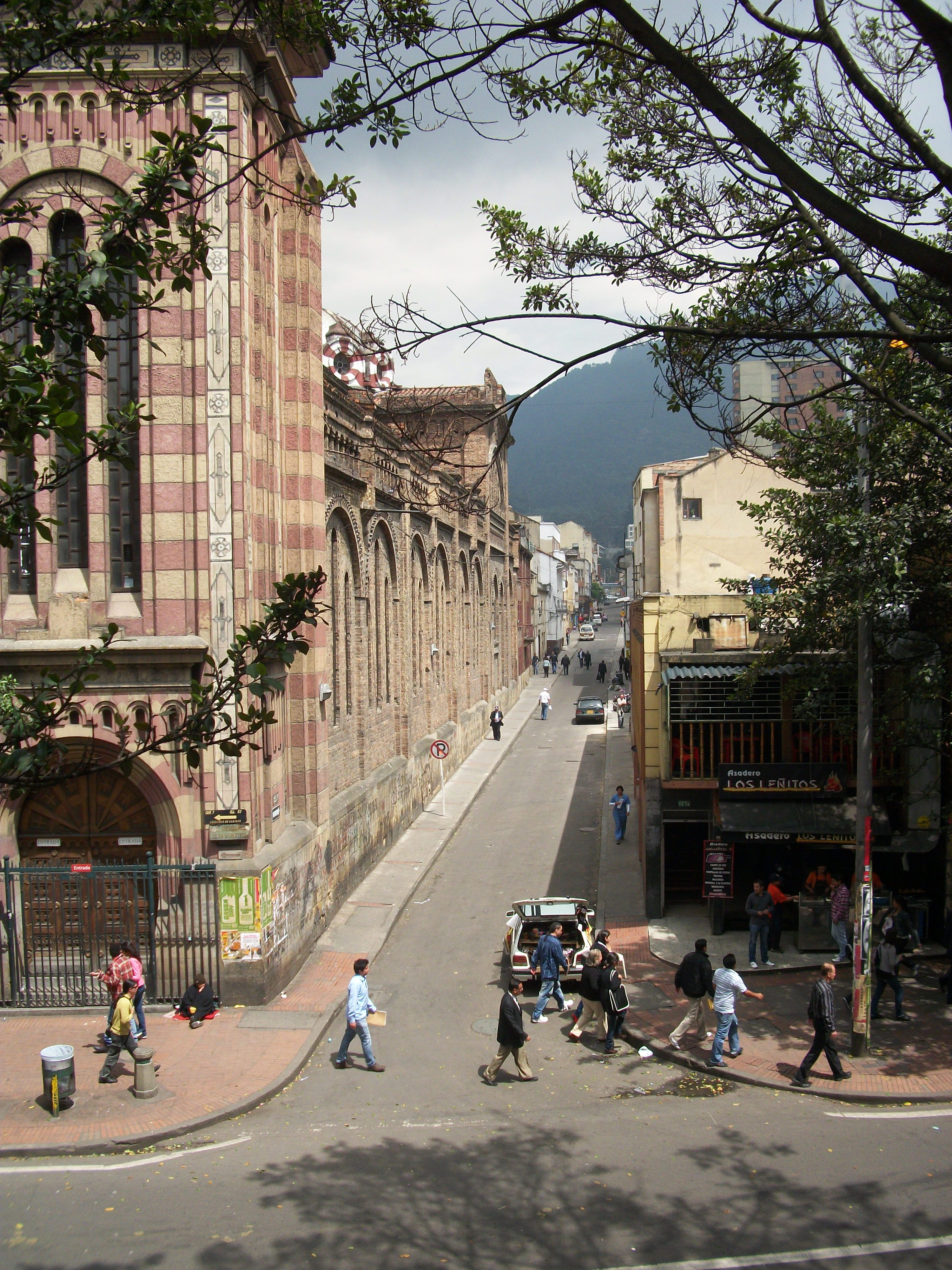 Bogotá. Iglesia de Las Nieves, calle 20 con carrrera 7, antigua calle del Panteón. Localidad de Santa Fe.